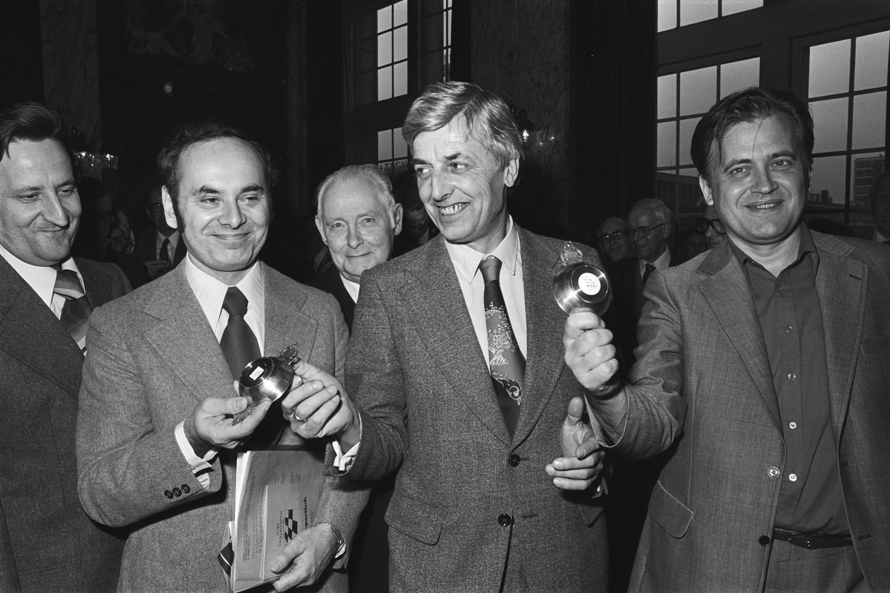 Collectie / Archief : Fotocollectie Anefo Reportage / Serie : Loting voor de schaaktweekamp tussen de grootmeesters Portisch en Larsen voor de kwartfinale kandidaten bij het WK toernooi Beschrijving : Van links naar rechts de Hongaar Portisch, de Rotterdamse wethouder De Jong en de Deen Larsen Datum : 25 februari 1977 Locatie : Rotterdam, Zuid-Holland Trefwoorden : lotingen, schakers, toernooien Persoonsnaam : Larsen, Bent, Portisch, Lajos Fotograaf : Peters, Hans / Anefo Auteursrechthebbende : Nationaal Archief Materiaalsoort : Negatief (zwart/wit) Nummer archiefinventaris : bekijk toegang 2.24.01.05 Bestanddeelnummer : 929-0464